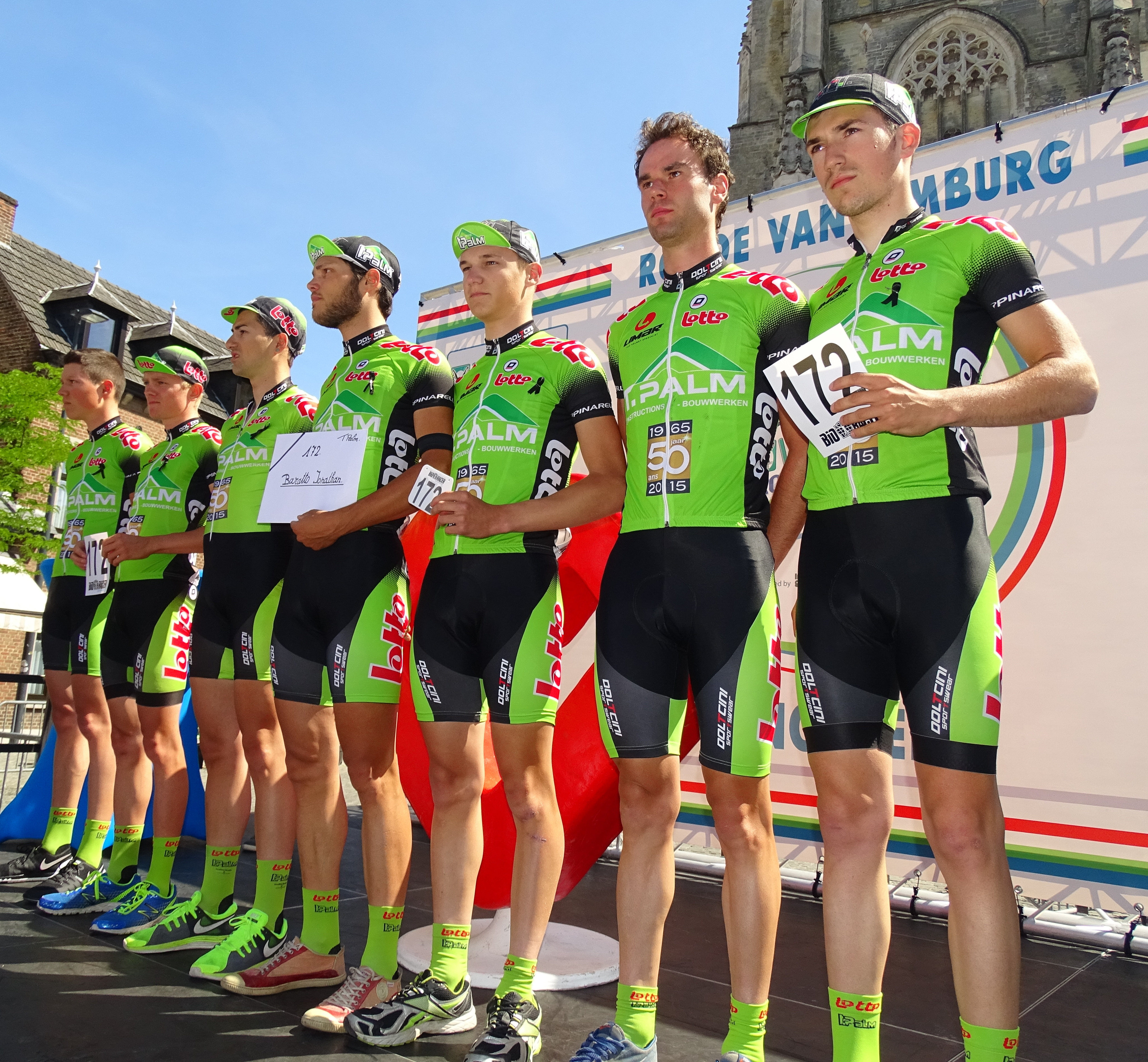 Reportage réalisé le dimanche 14 juin à l'occasion du départ et de l'arrivée du Tour du Limbourg 2015 à Tongres, Belgique.